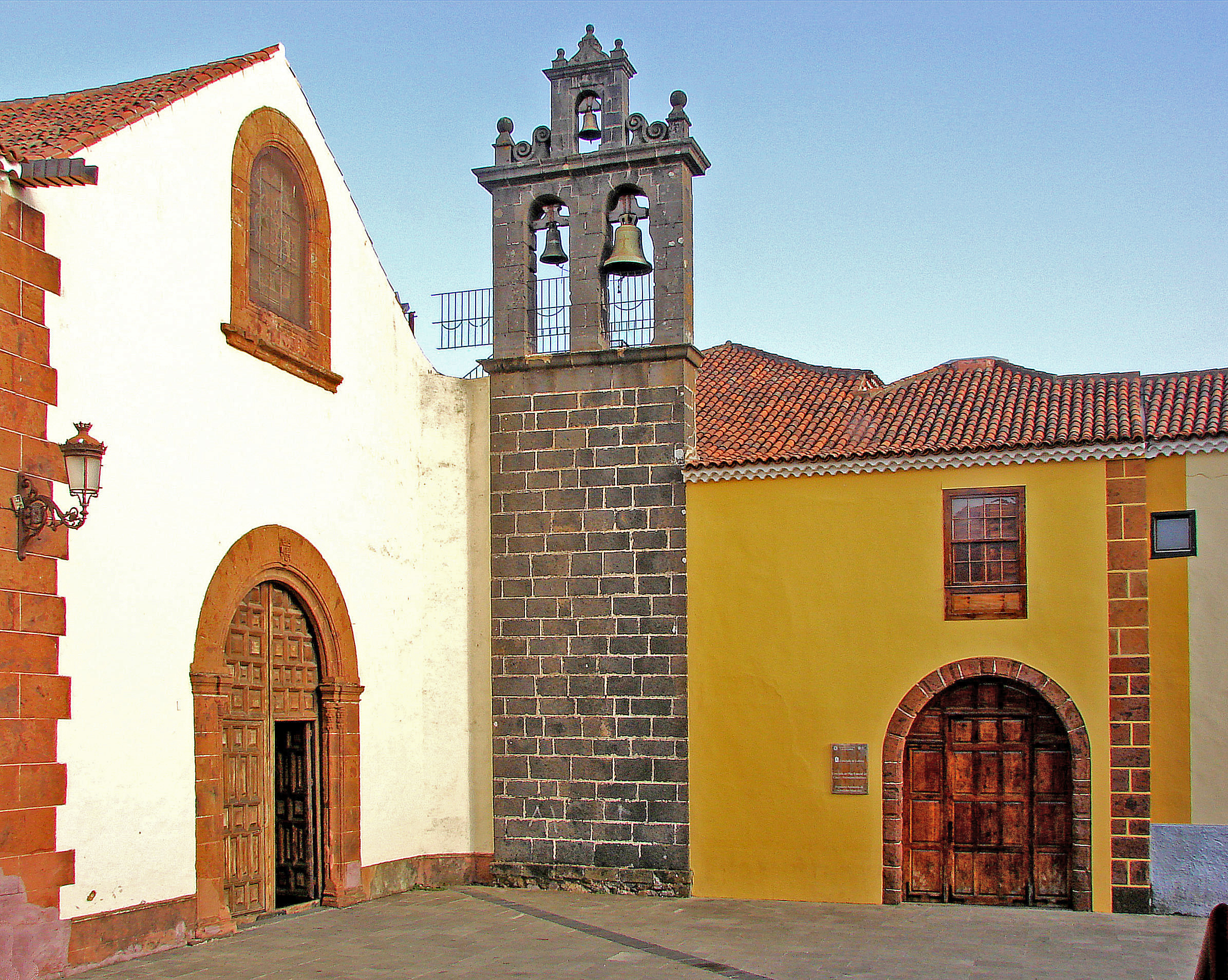 Convento Santo Domingo La Laguna